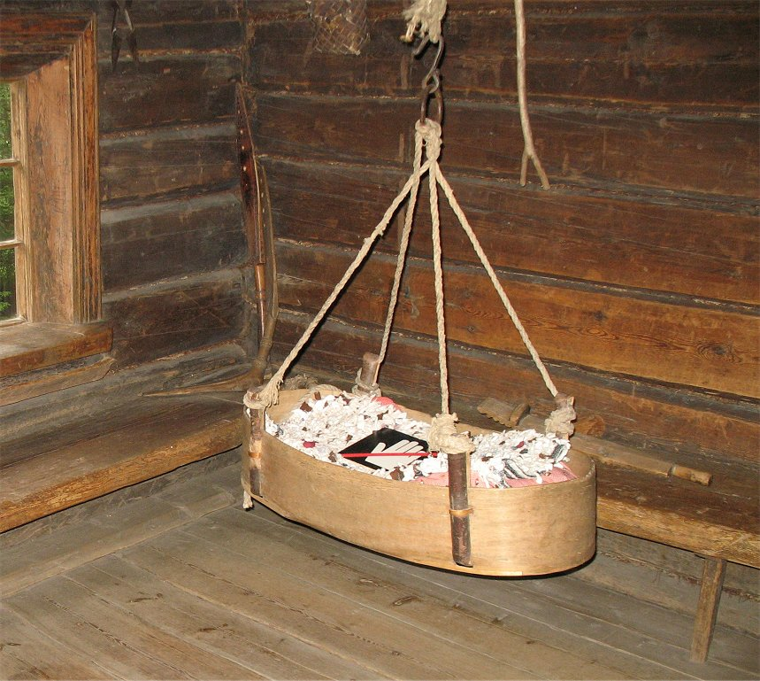 Katosta riippuva kehto. Seurasaaren museot, Helsinki. (kesä 2009).